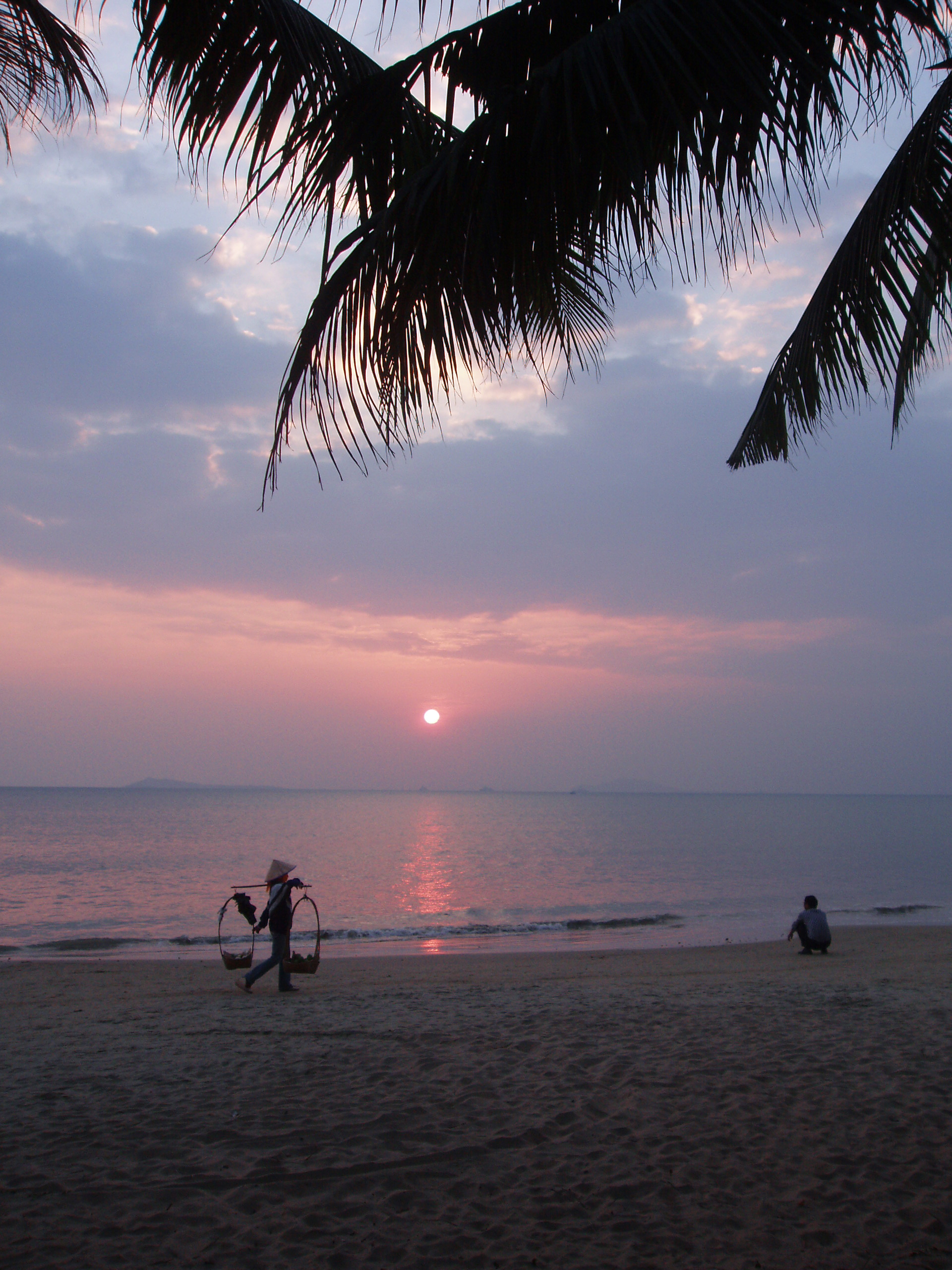 Sunset at Sanya Bay in Sanya, Hainan, China